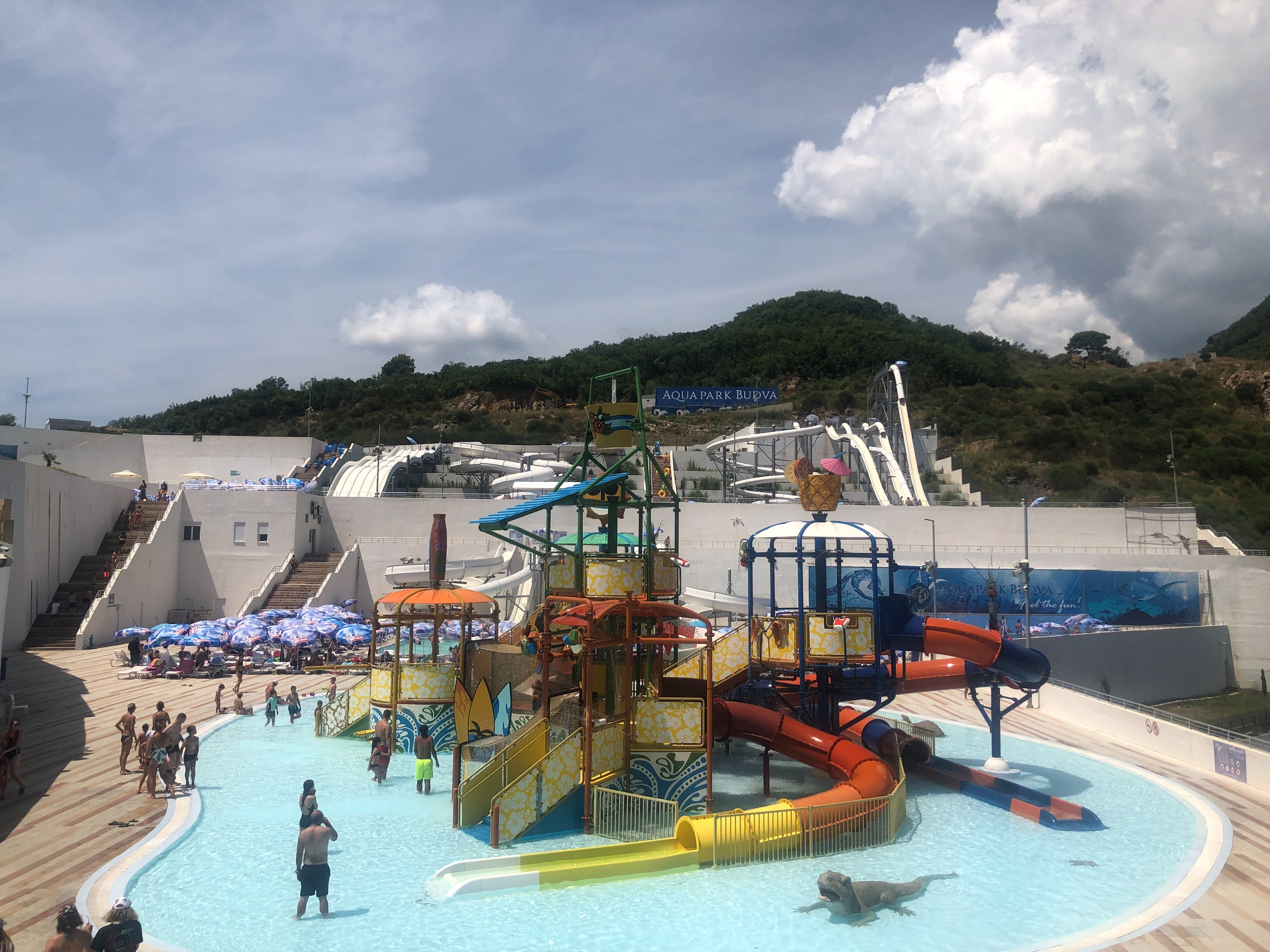 Aquapark Budva in 2019